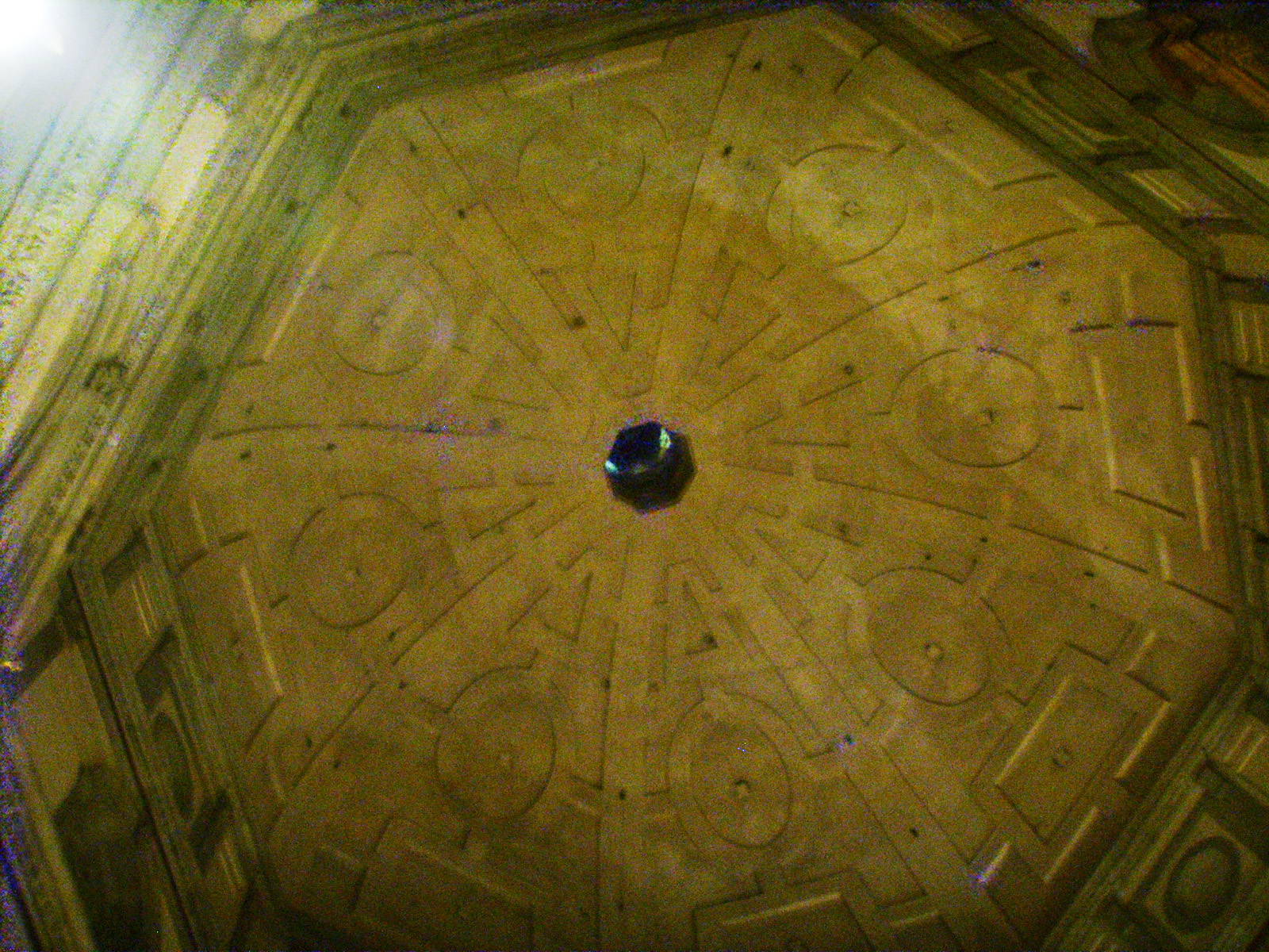 Pistoia, madonna dell'umiltà, cupola 03 (brighter)